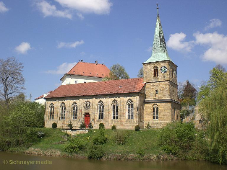 Evang. Kirche in Schney